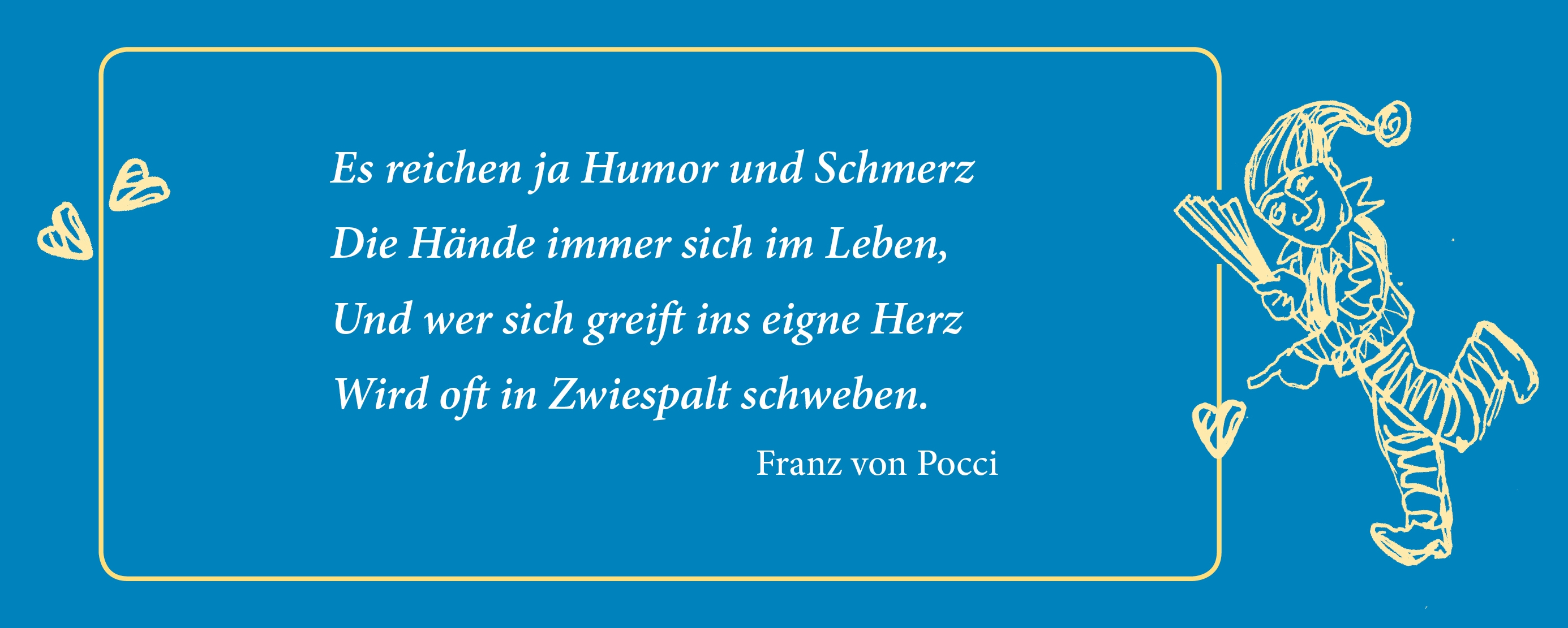 Zu den gespielten Inszenierungen passende Zitate mit Hintersinn und Humor sind fester Bestandteil des gedruckten Spielplans (2011).